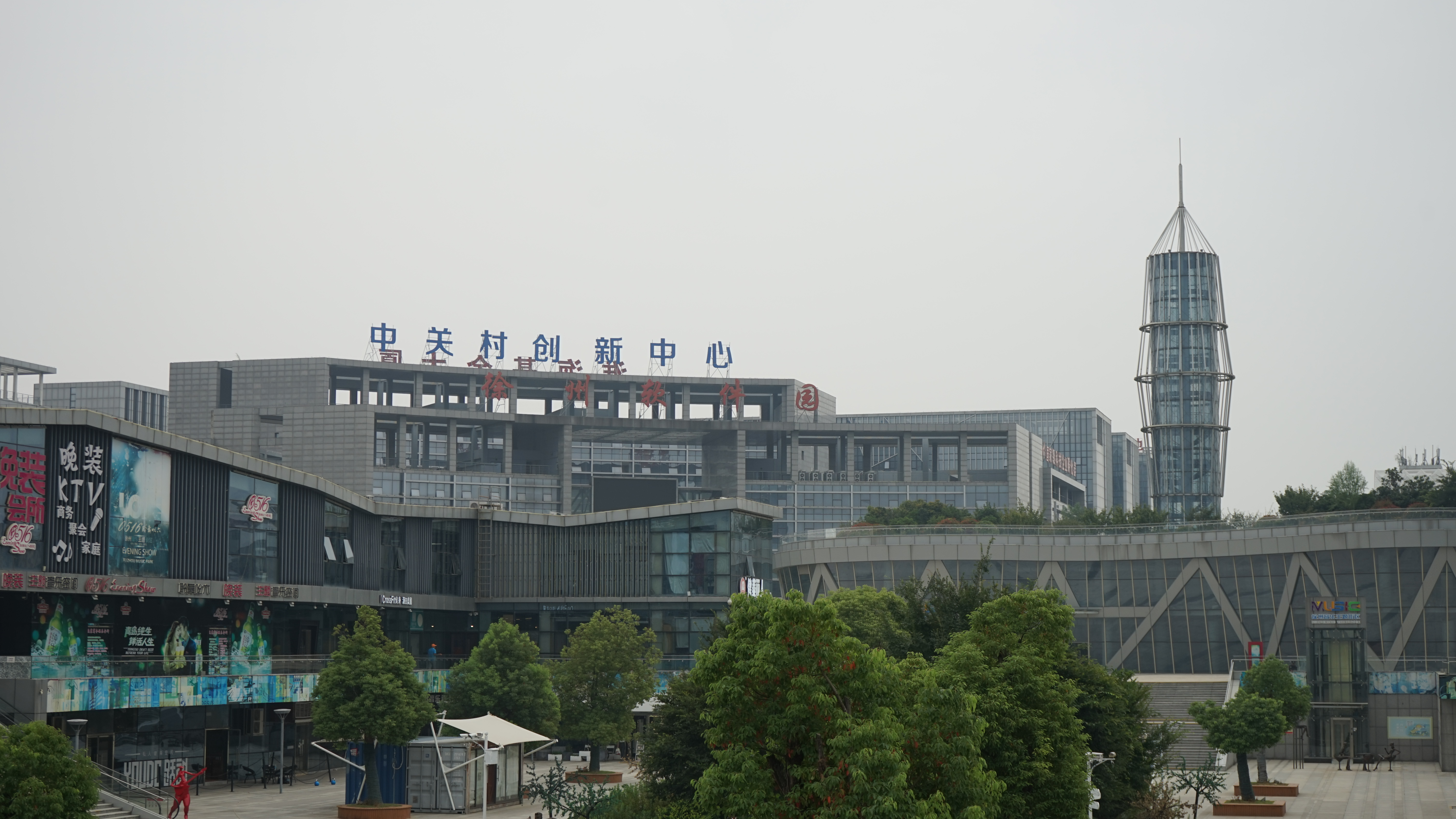 中文（中国大陆）: 徐州软件园2017